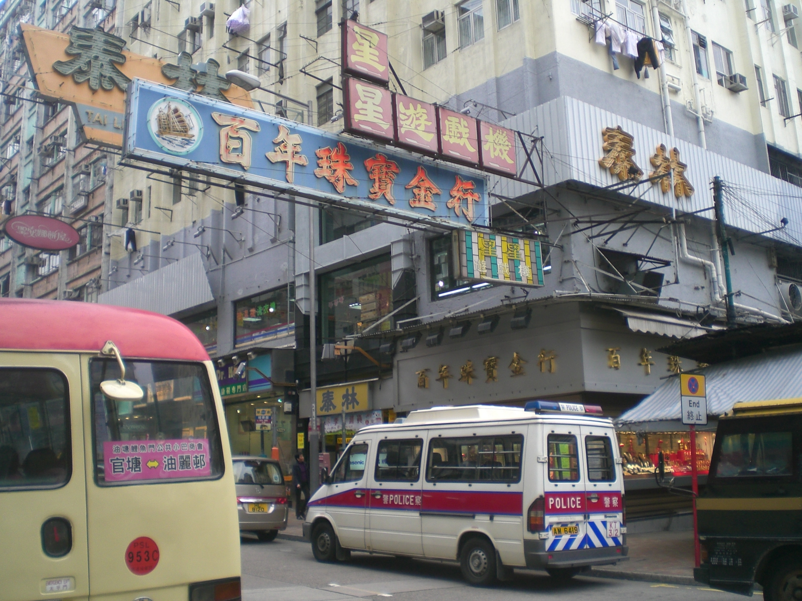 觀塘物華街